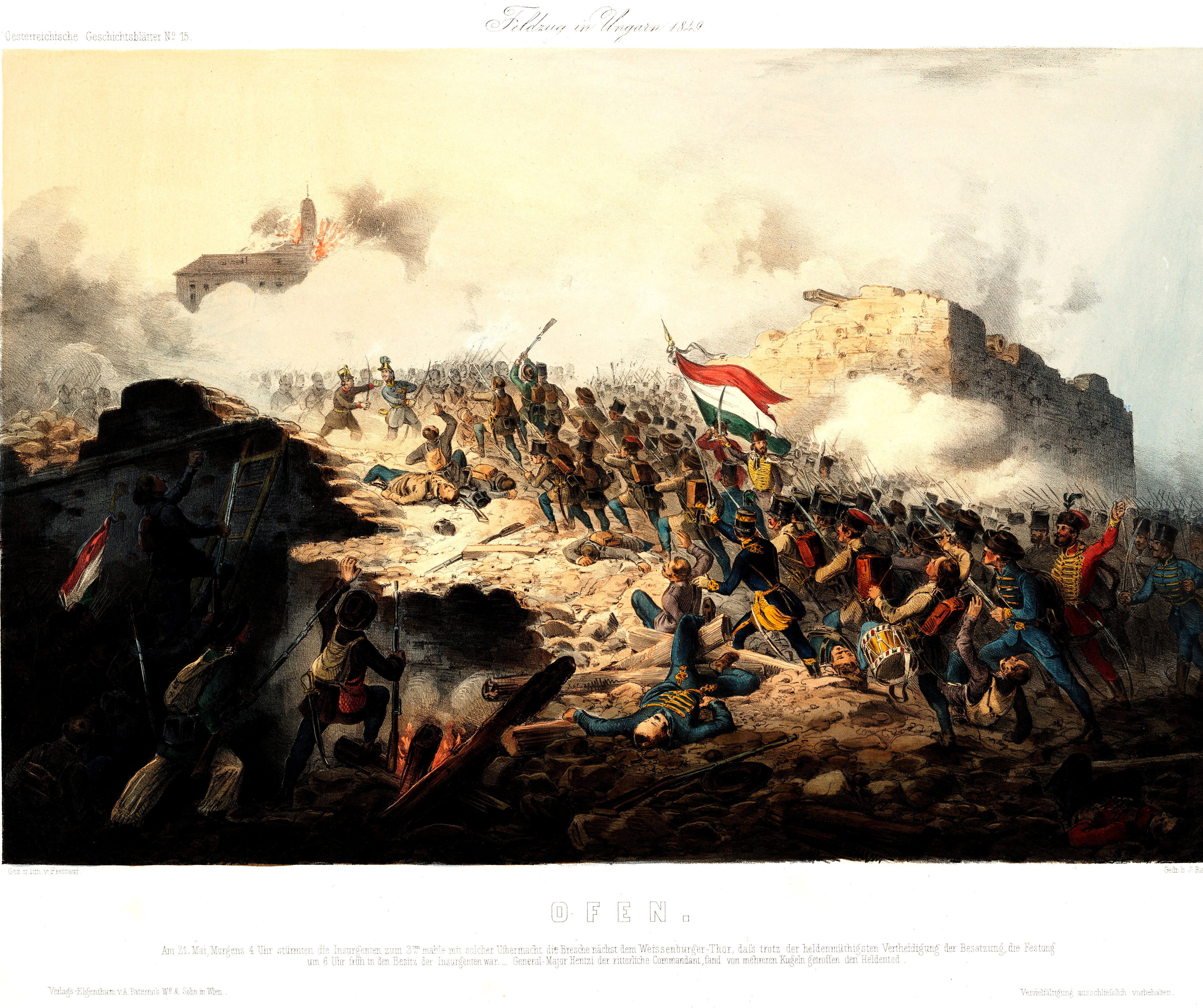 Buda ostroma az 1848–49-es forradalom és szabadságharc tavaszi hadjáratának csúcspontja volt, amely 1849. május 4-étől május 21-éig tartott, és az ostromló magyar erők győzelmével ért véget.